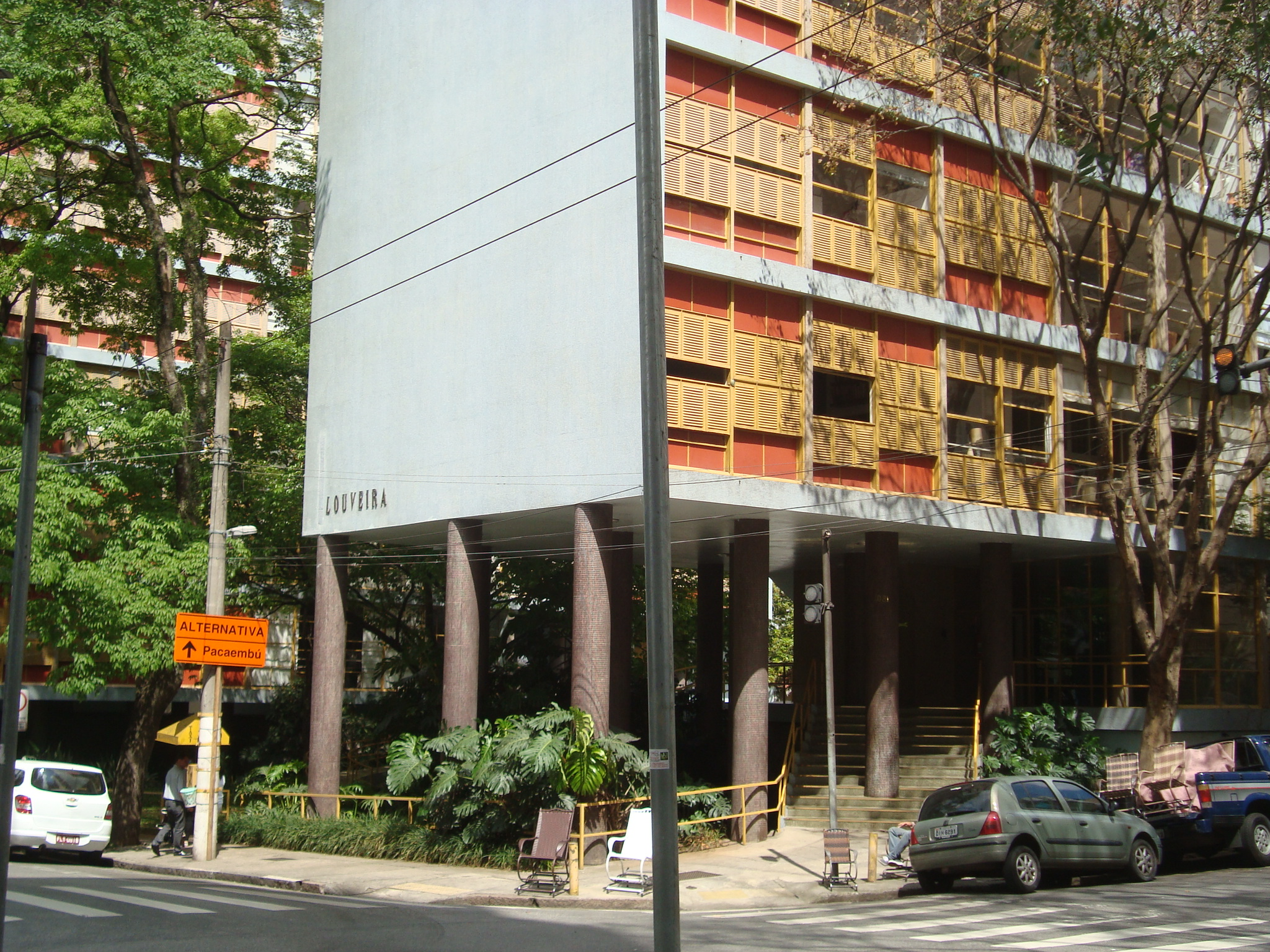 Fachada de parte do Edifício Louveira, construção residencial, localizado no bairro de Higienópolis, em São Paulo.